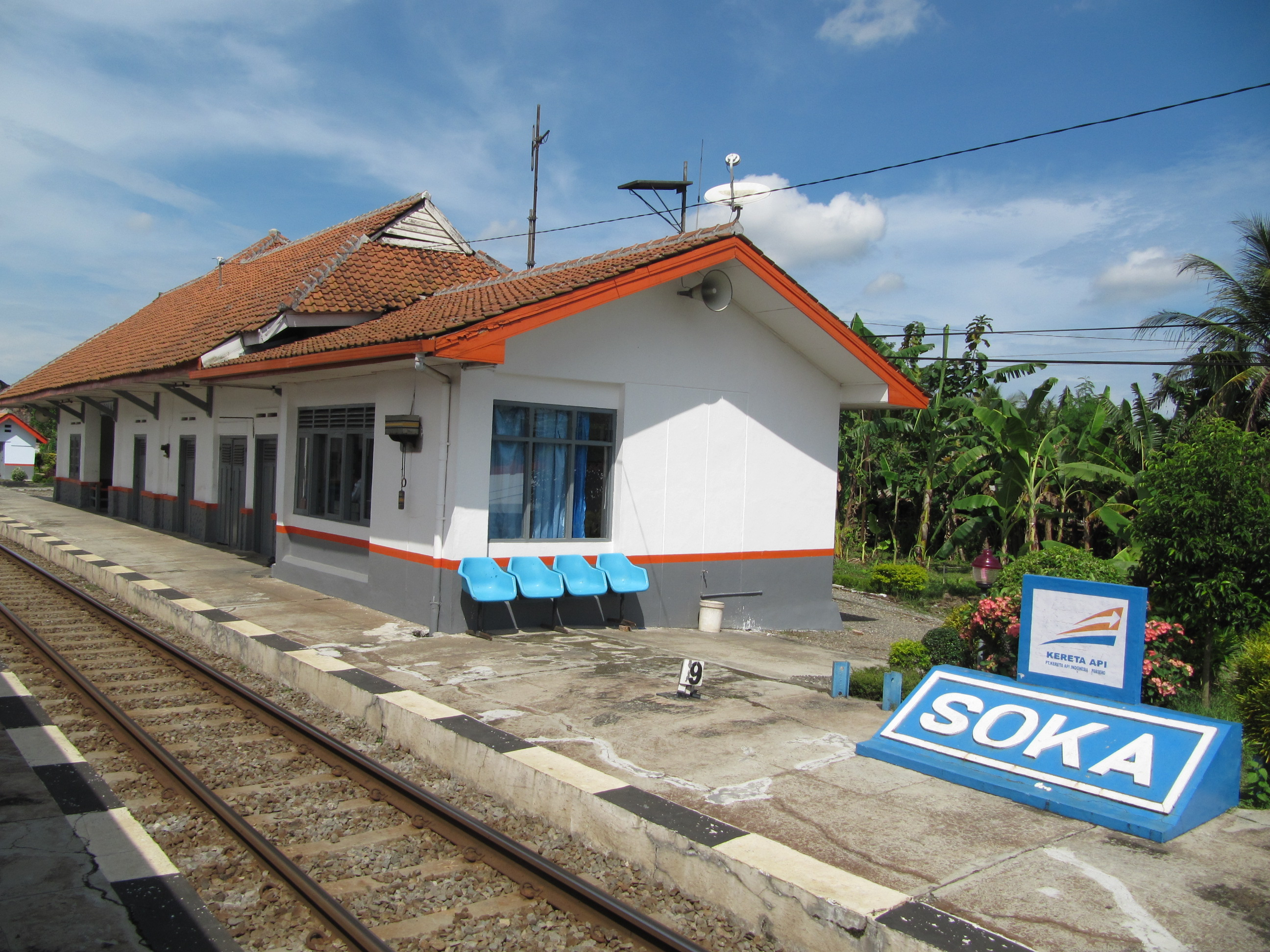 station Soka